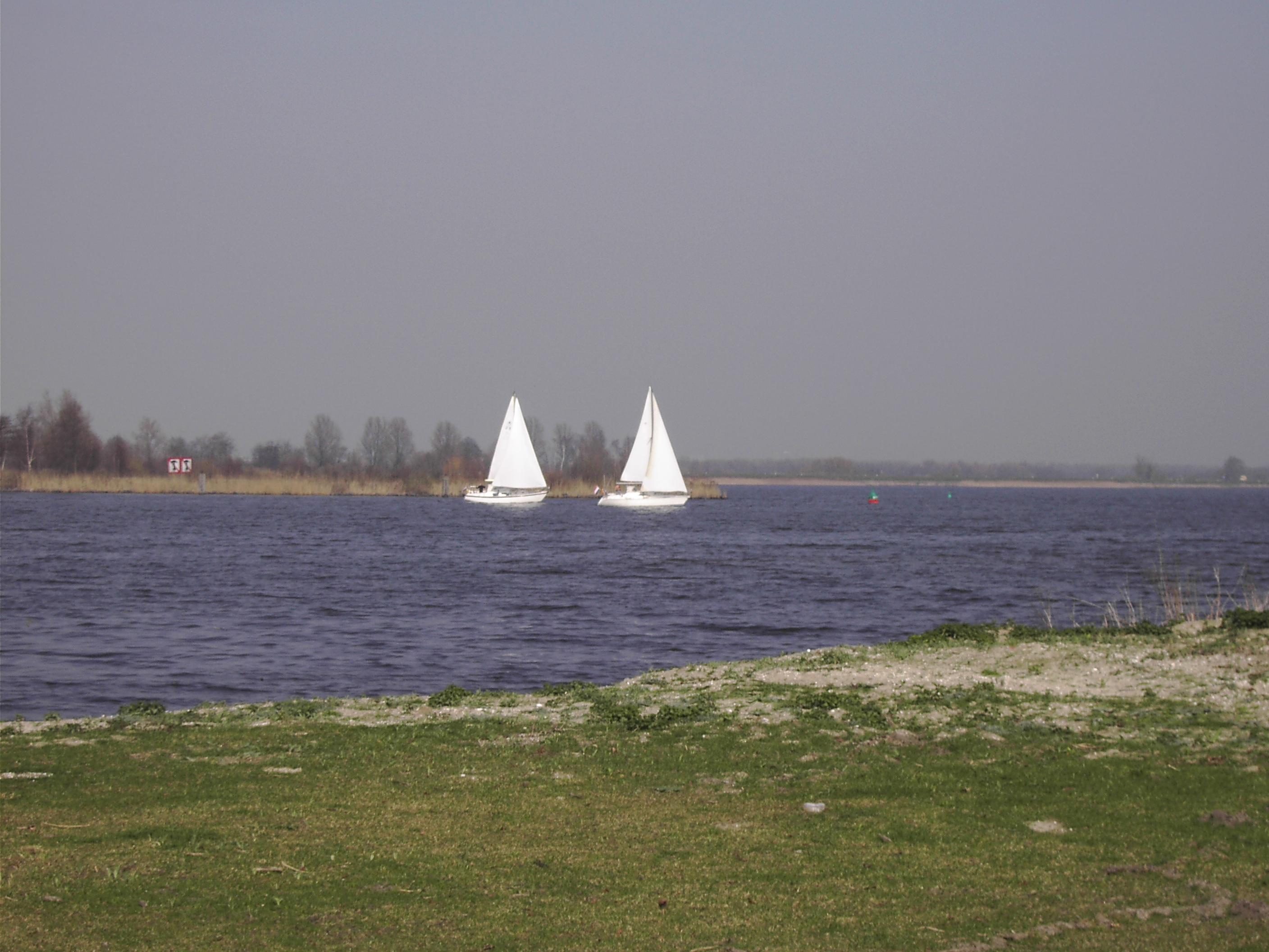 naarderbos]